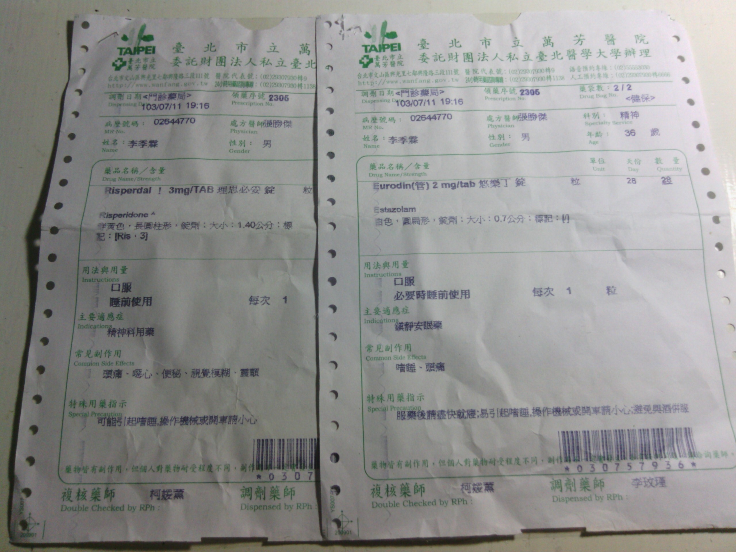 中文（台灣）: 臺北市立萬芳醫院藥袋，2014年7月11日調劑。